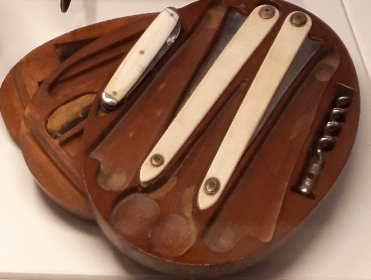 Partie d'un nécessaire de voyage de Maire (XVIIIe siècle), Musée du bagage de Haguenau